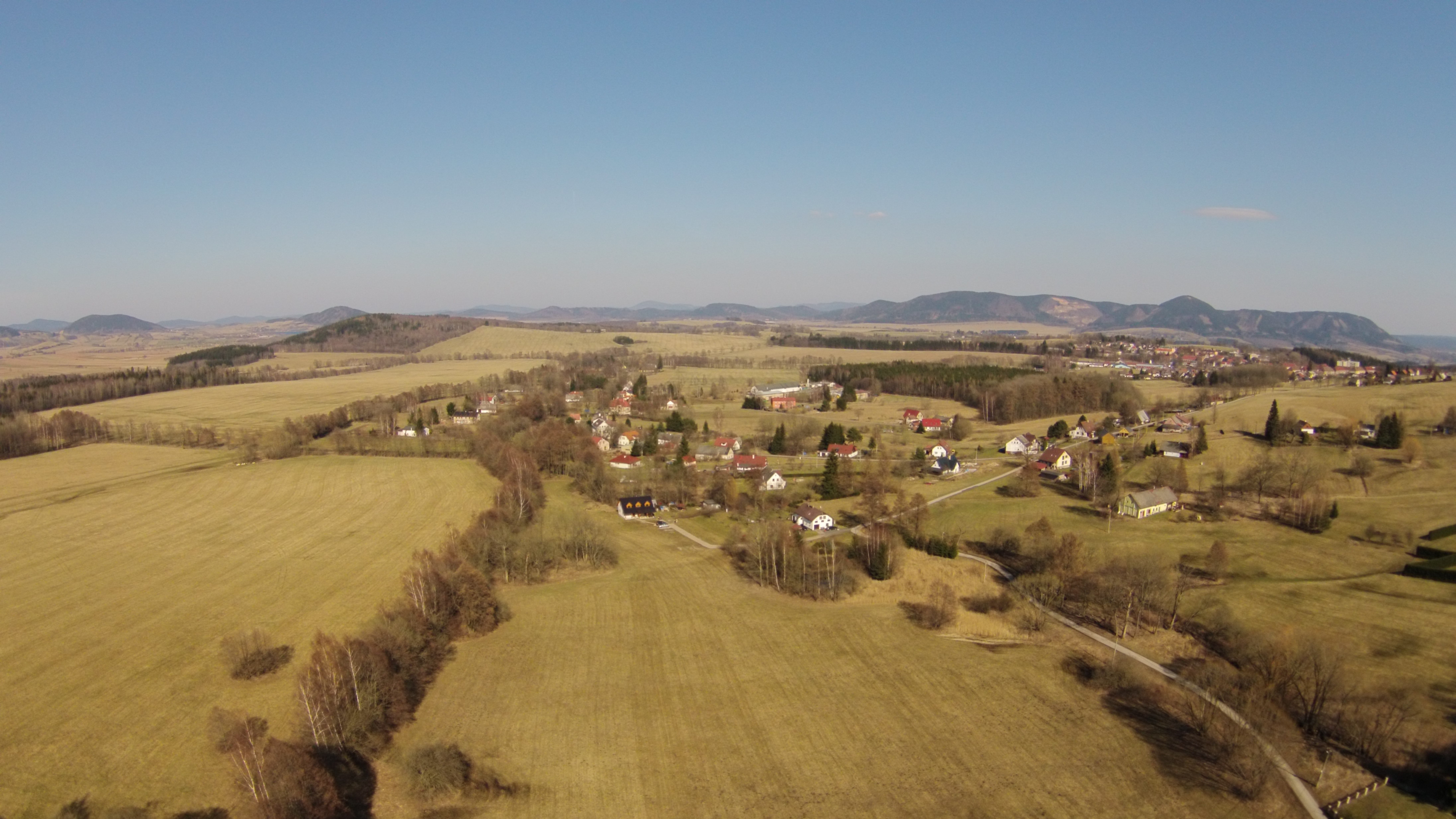 Žacléř ze vzduchu. Česká republika.